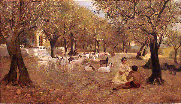 Pedro Weingärtner: Daphnis e Chloe, sem data, acervo do Museu de Arte do Rio Grande do Sul Ado Malagoli.